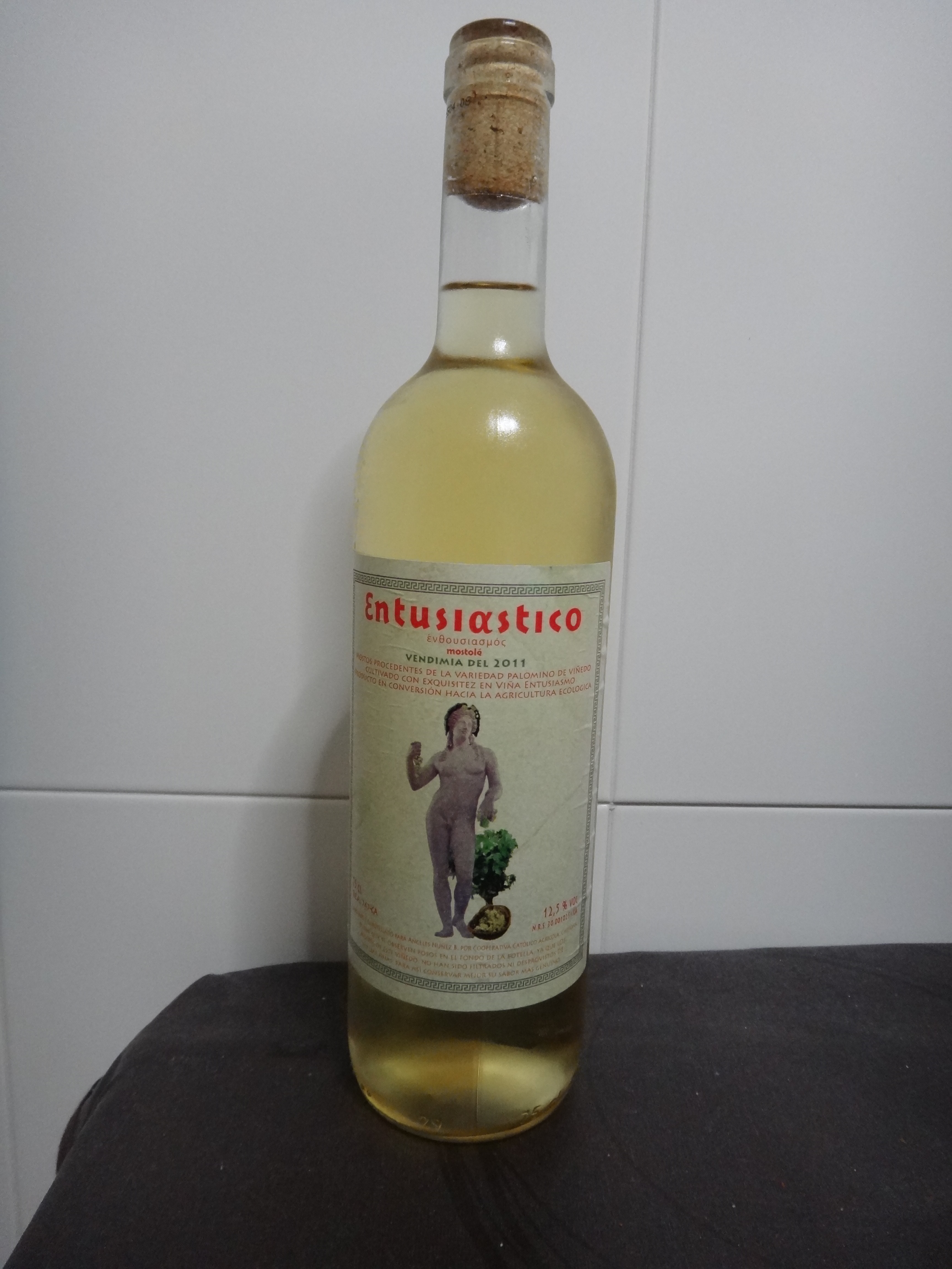 Botella de Mosto de Trebujena procedente de uva ecológica